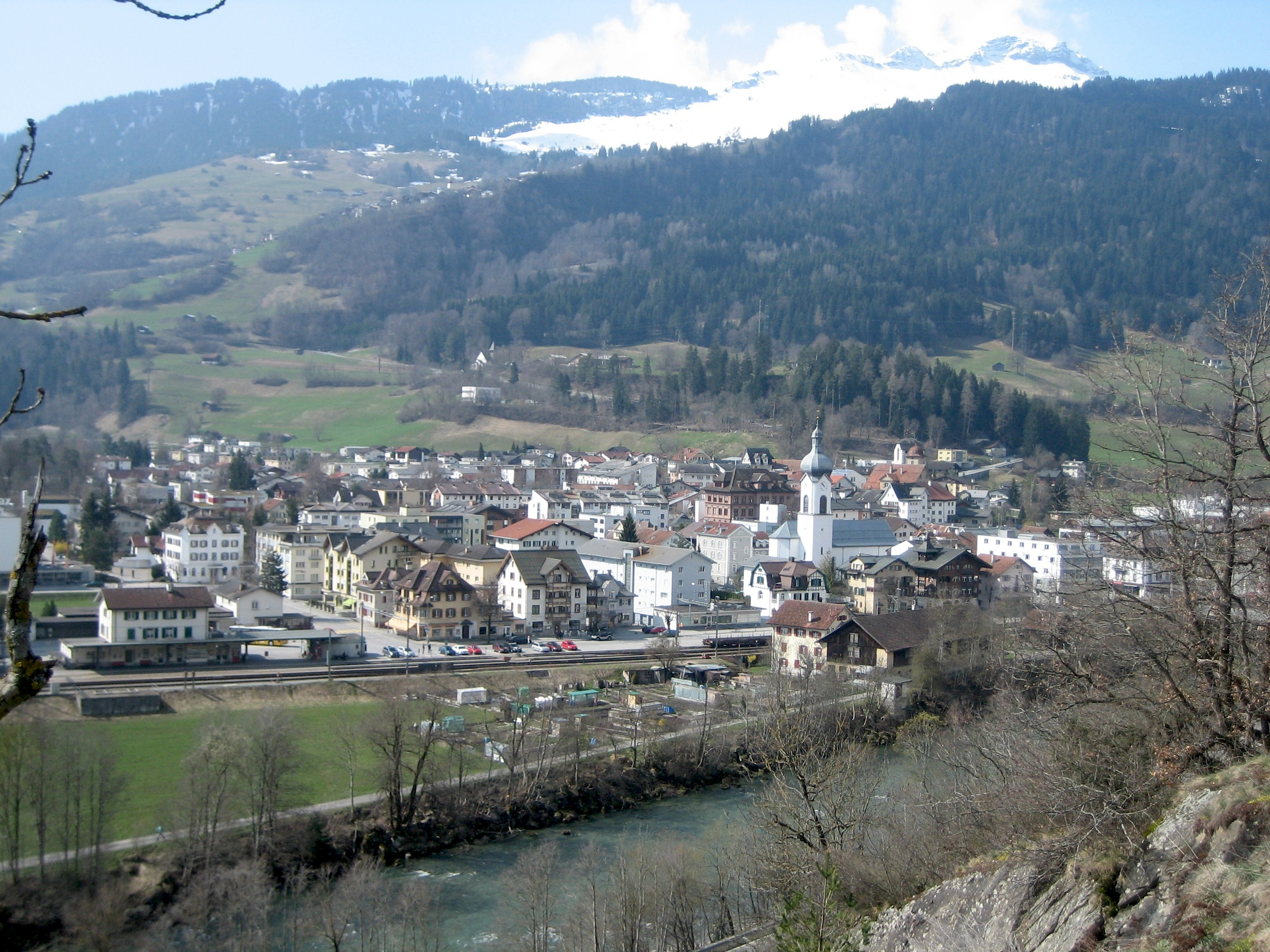 Ilanz